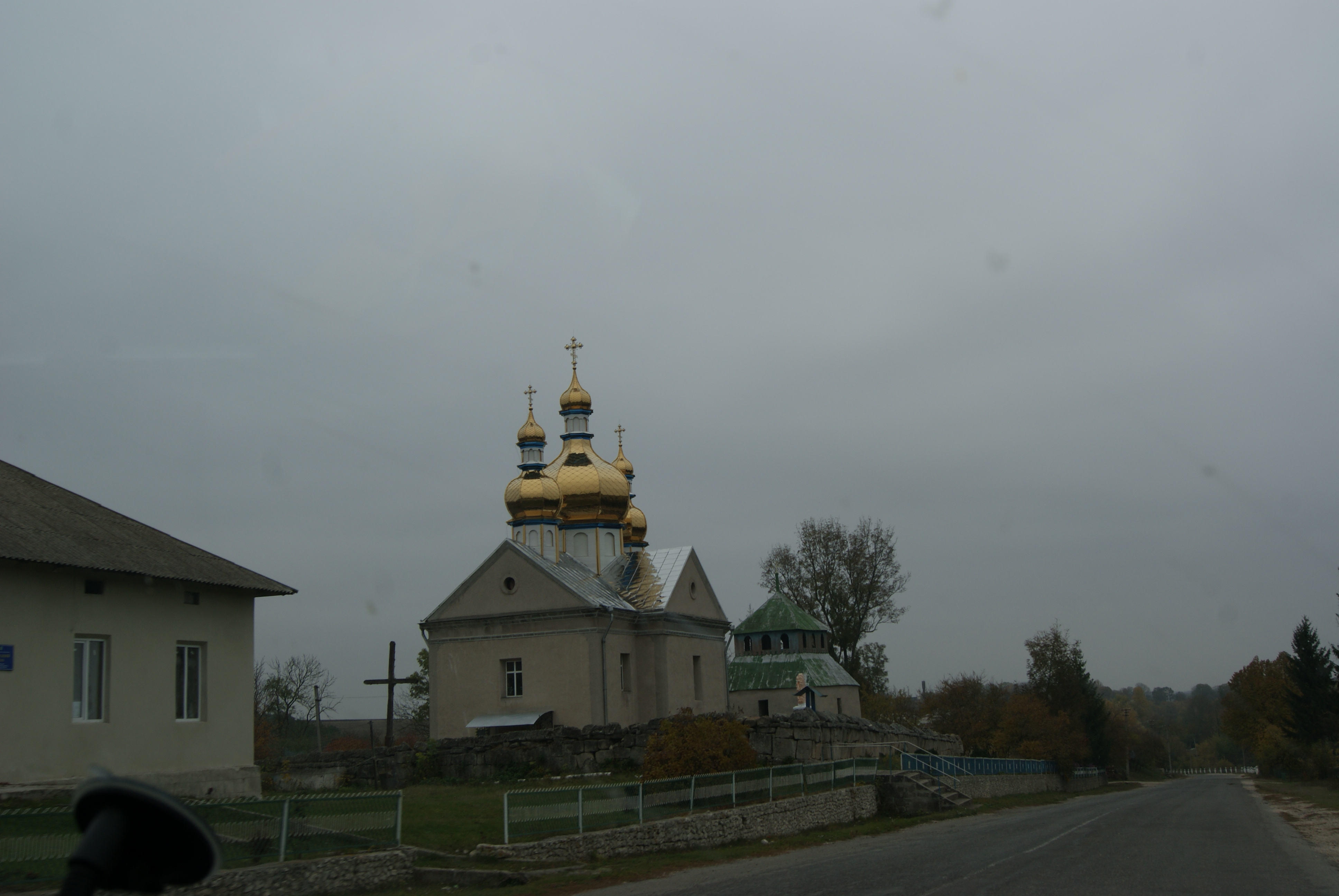 Храм св.Юрія с.Шельпаки